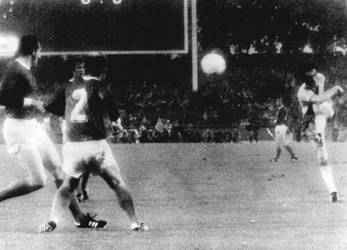 ADN-ZB-AP-Tele-30.6.74-ma-BRD-Düsseldorf: X. Fußball-Weltmeisterschaft-2. Finalrunde, Gruppe B: BRD - Schweden 4:2- 26. Spielminute: Ralf Edström (rechts) erzielt mit einem 16-m-Schuß das überraschende 1:0-Führungstor für Schweden. Links Georg Schwarzenbeck, daneben (Nr.2) Berti Vogts (beide BRD).